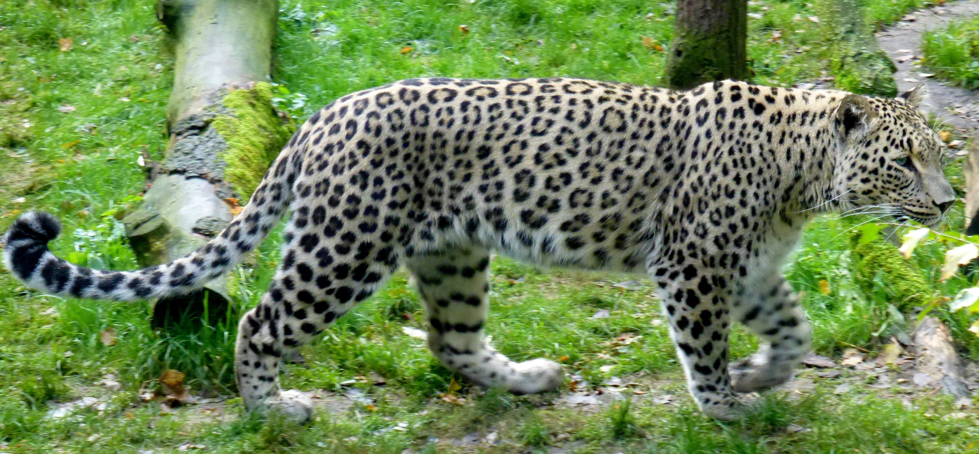 Nordpersischer Leopard